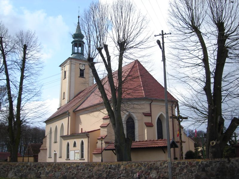 Kościół w Szczańcu